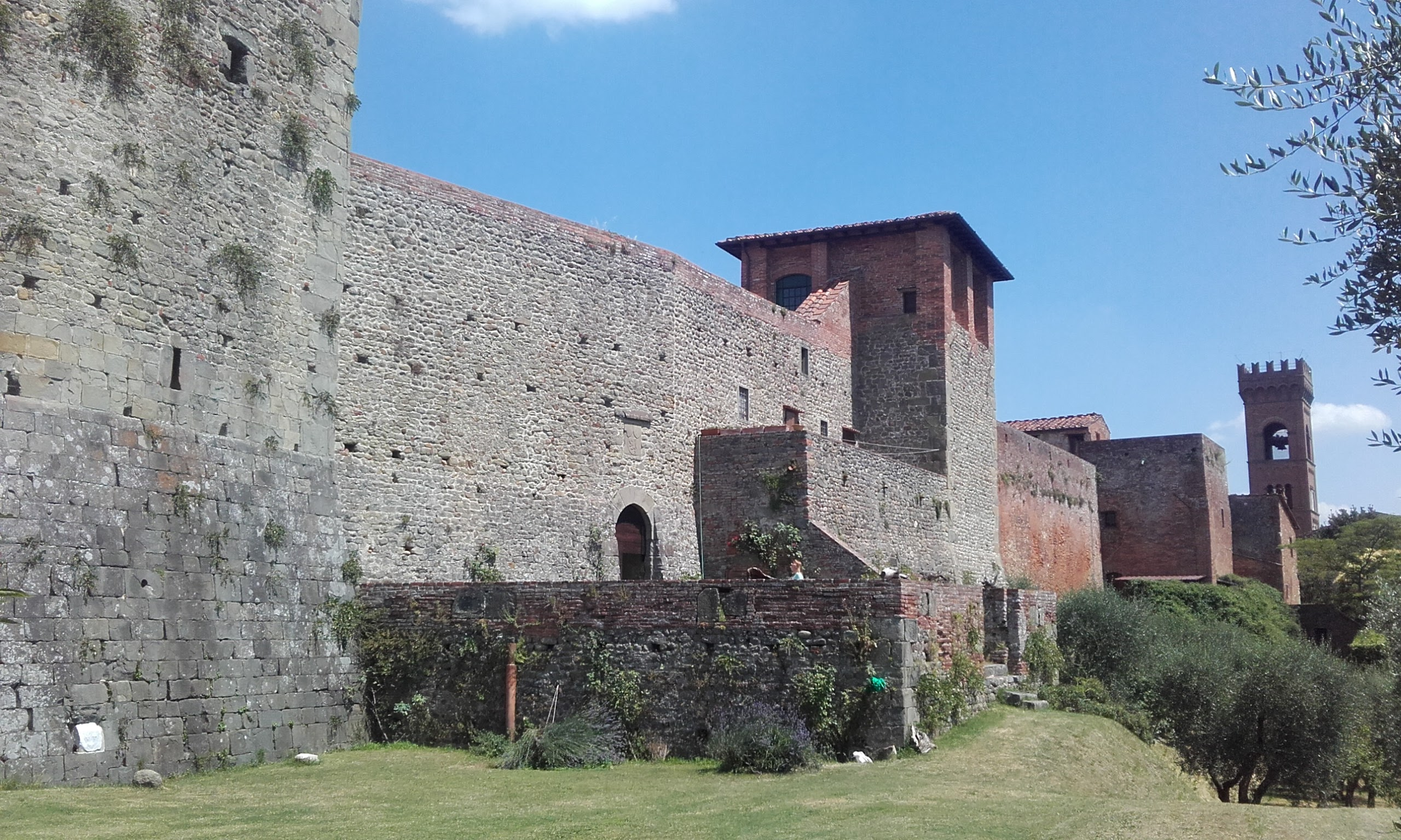 Hradební zeď s brankou a jednou obrannou věží, která v současnosti slouží jako obytná část hradu a věž je tedy nepřítupná.